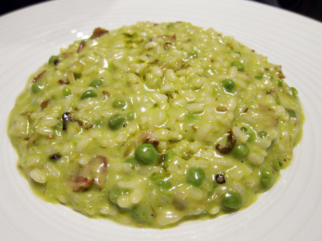 Risi e Bisi (Risotto of peas, pancetta, and onion)